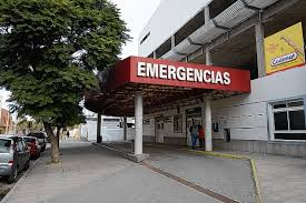 Servicios de Emergencias